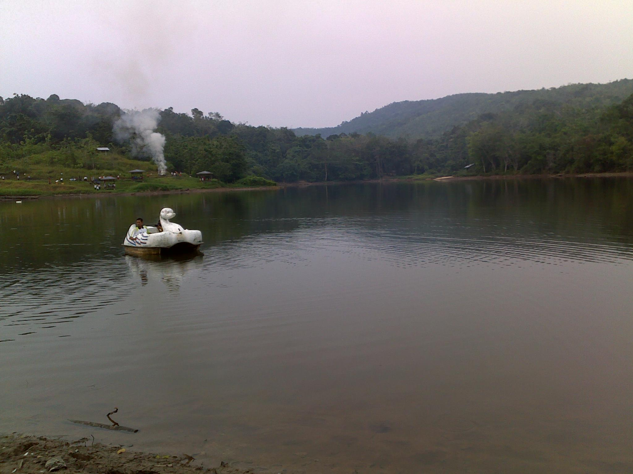 Danau Sipogas Rokan Hulu